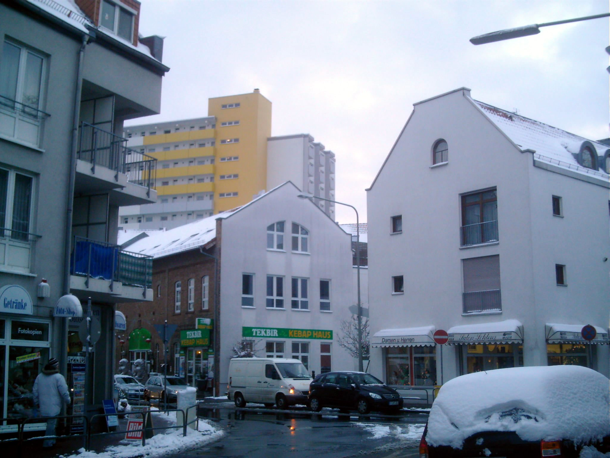 selbst aufgenommen